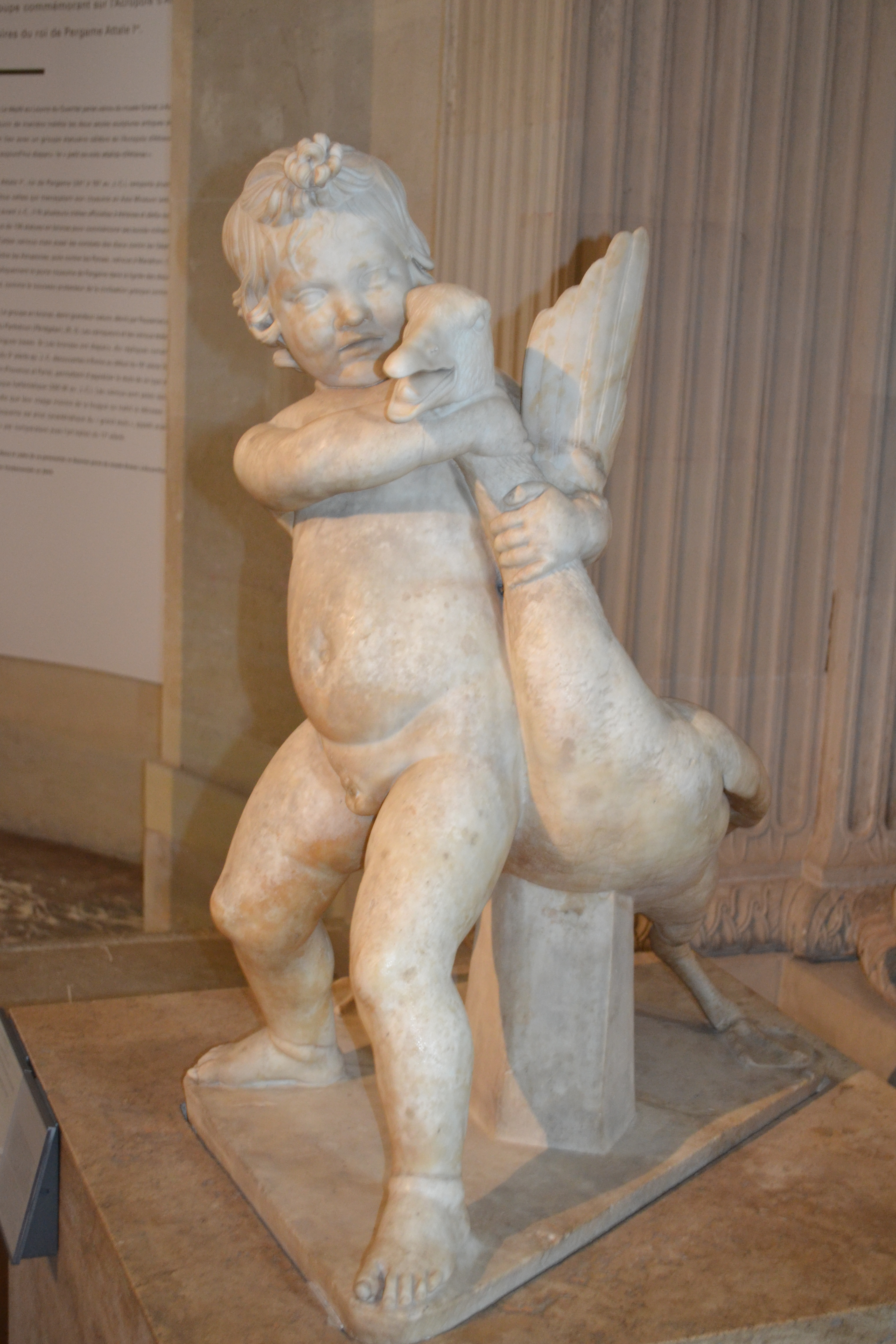 Enfant à l'oie. Copie romaine d'époque impériale (Ier–IIe siècle ap. J.-C.) d'un original grec du IIe siècle av. J.-C. Marbre, découvert en 1792 dans la villa des Quintilii, sur la Via Appia, près de Rome. Des statues du même type existent aussi à la Glyptothèque de Munich et aux Musées du Vatican.